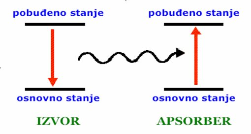 Rezonancijska apsorpcija